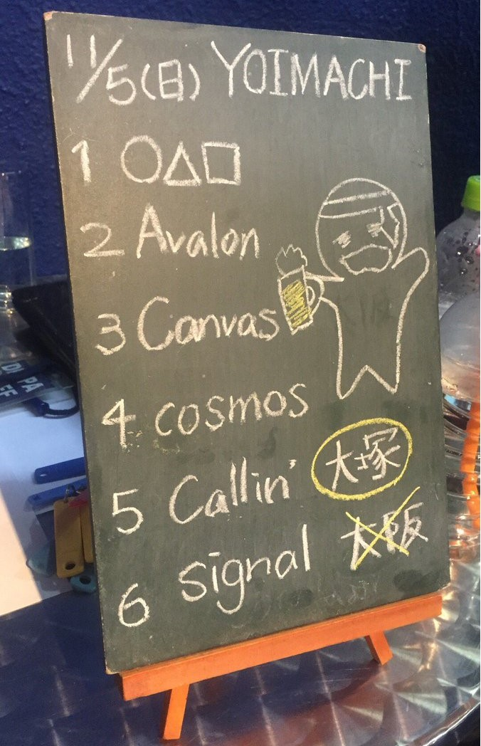 amiinAセトリボード(20171105(1))